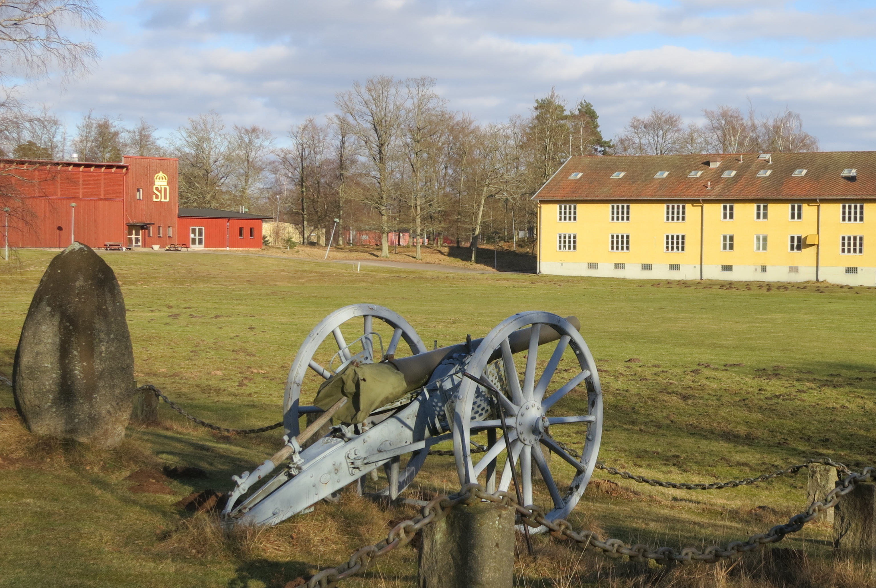 Skånska dragonregementet (P 2) fd lokaler